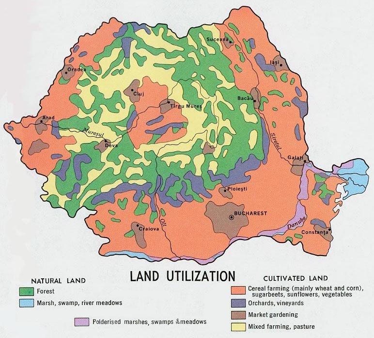 Romania - Land Utilization